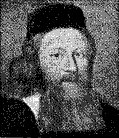 Bild Johan Carlberg från Svenskt biografiskt handlexikon 1906